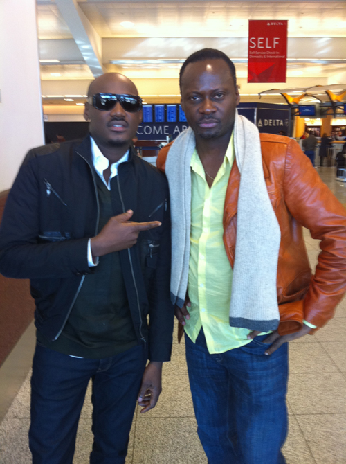 Ashonaiya Ashonaiya